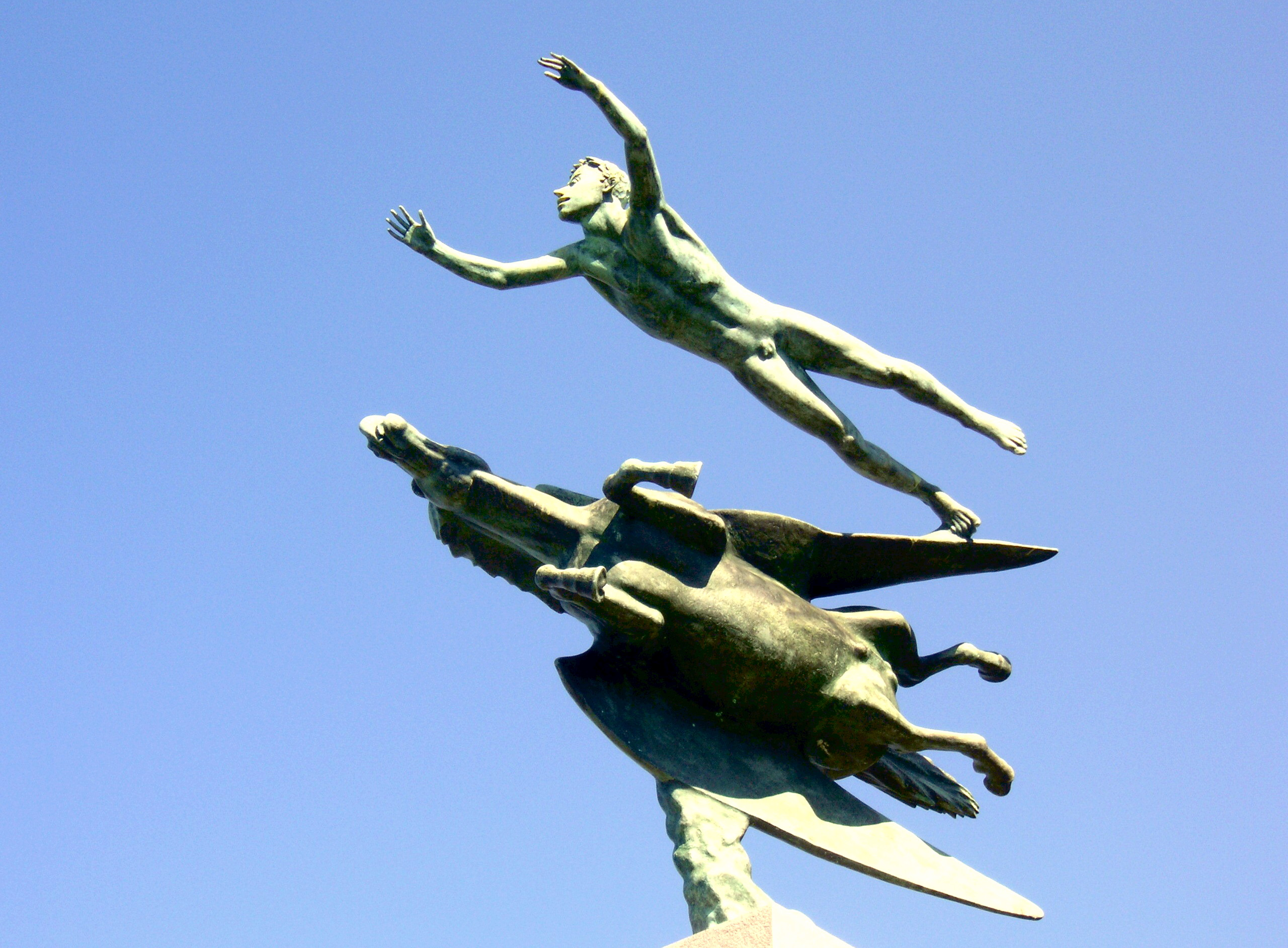 Carl Milles skulptur "Människan och Pegasus" i Skytteholmsparken, Ekerö